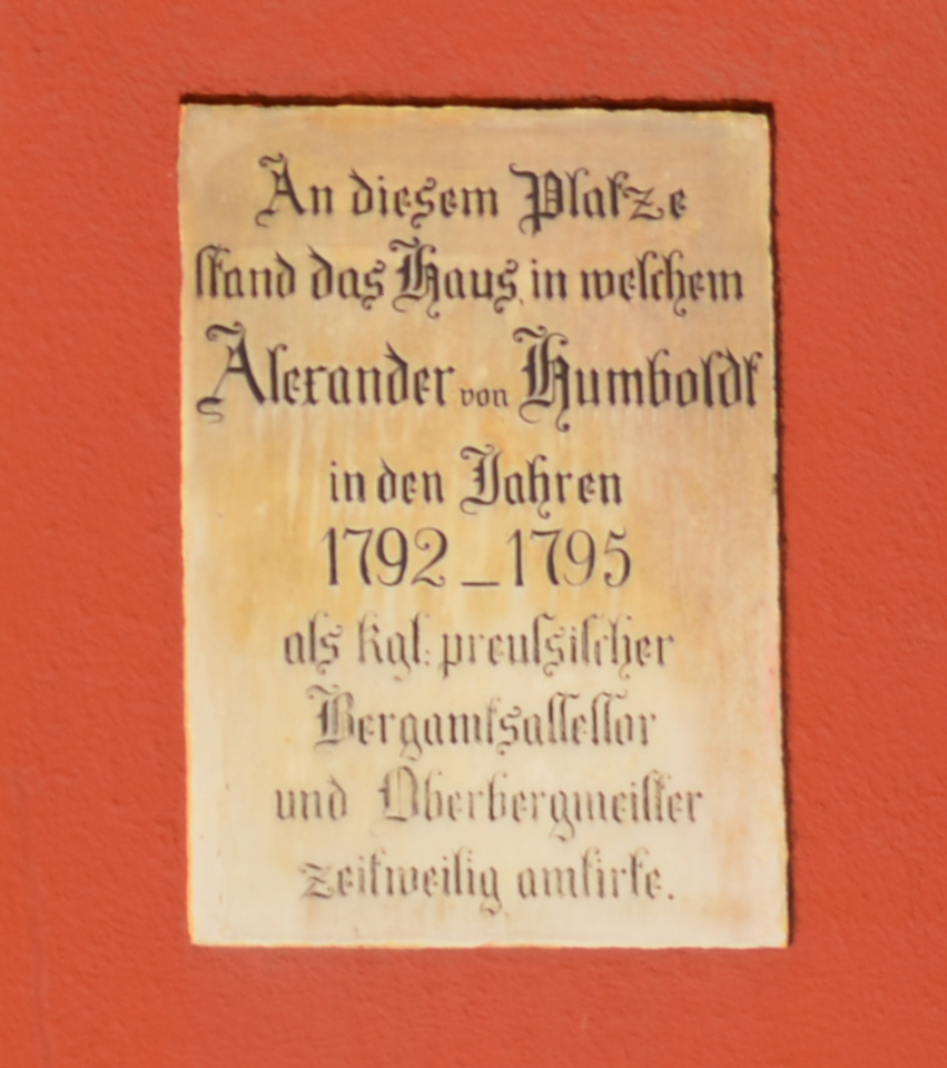 Inschrift in Erinnerung an Alexander von Humboldt, in Goldkronach, Bernecker Straße